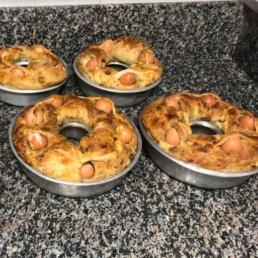 Casatielli napoletani fatti in casa